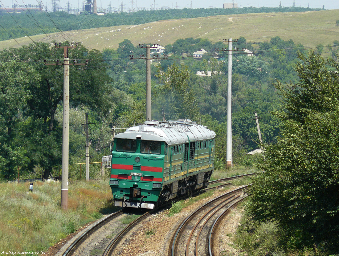 В 2012 году секция Б была порезана под номером 712А. Под номером 1175Б работает секция 712А.